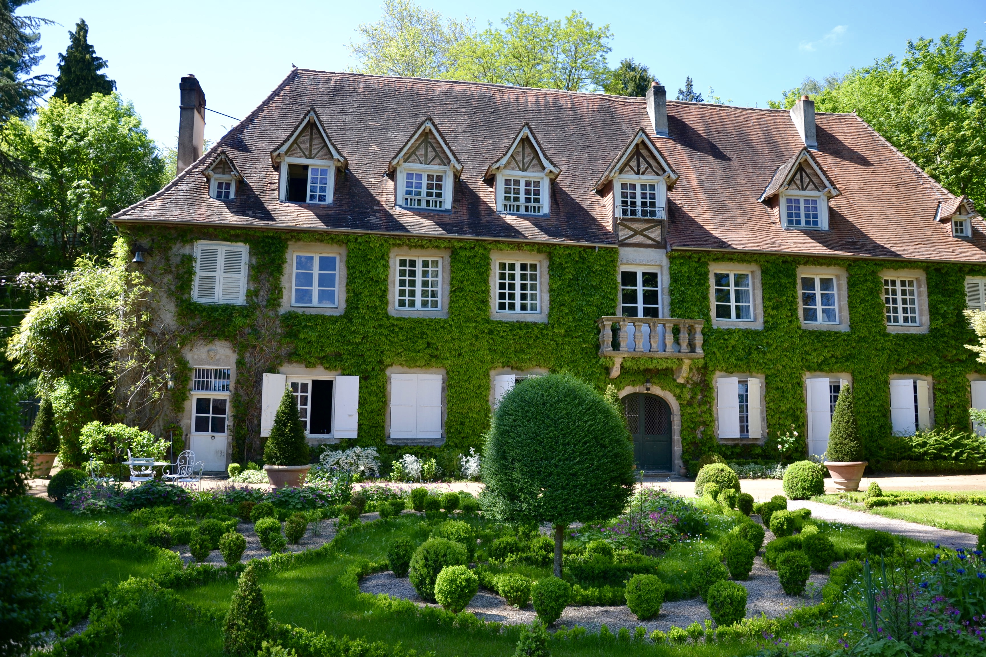 Le domaine du Poudrier (Limoges, Haute-Vienne, France).